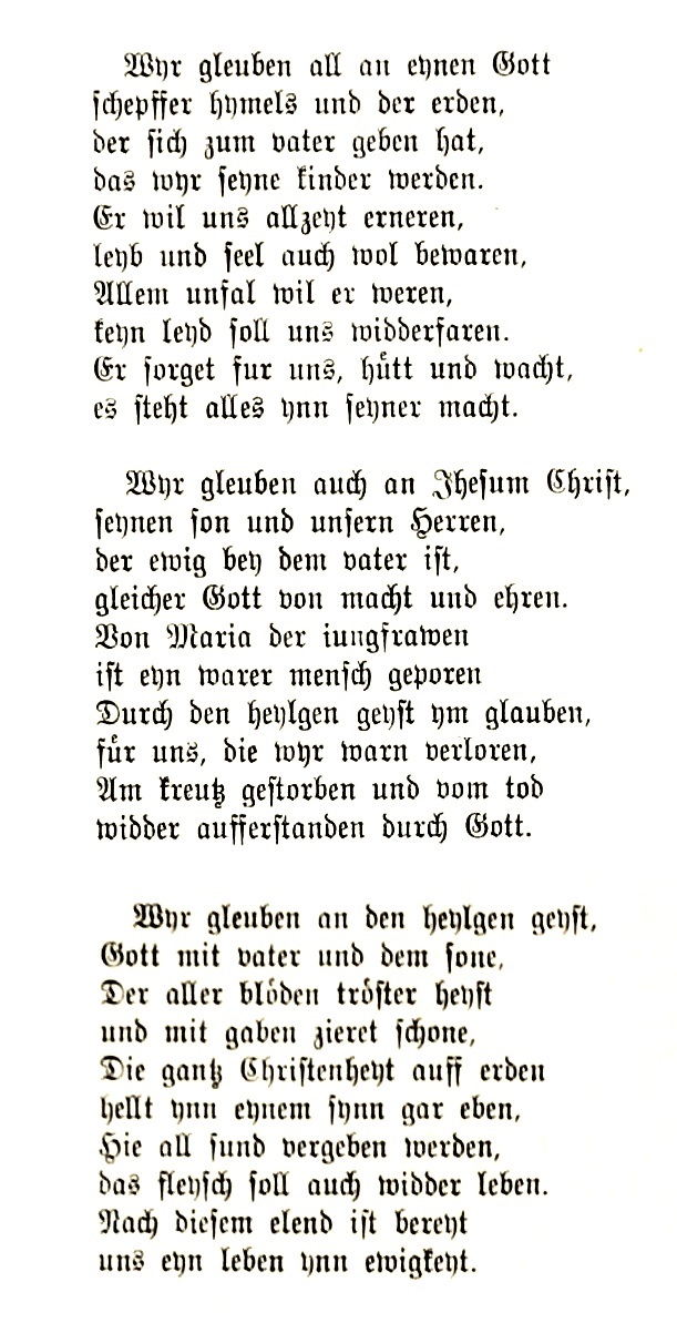 Martin Luther: Wir glauben all an einen Gott, Urtext nach WA 35